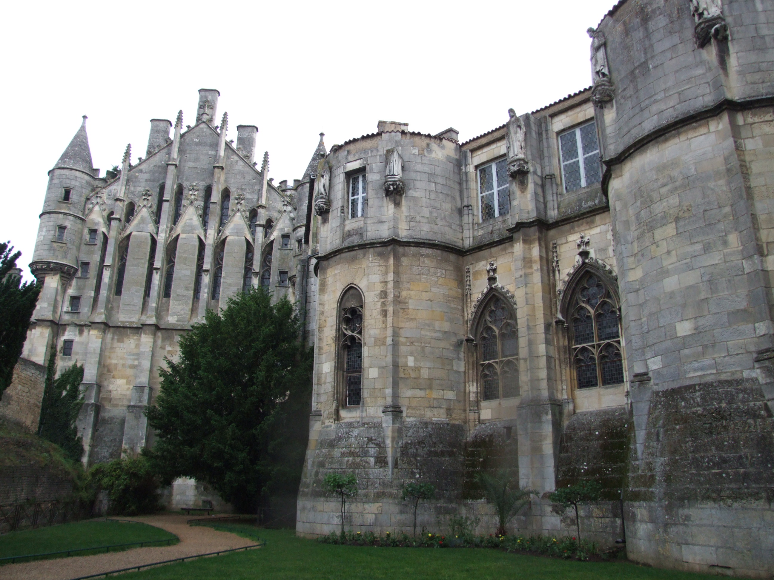 Palais de Justice, Poitiers, Poitou-Charentes, FRANCE